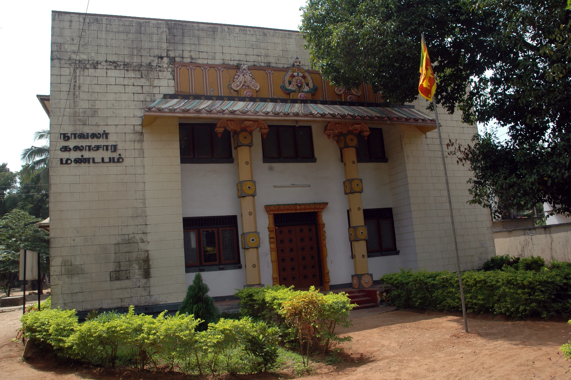 நாவலர் கலாச்சார மண்டபம், யாழ்ப்பாணம்